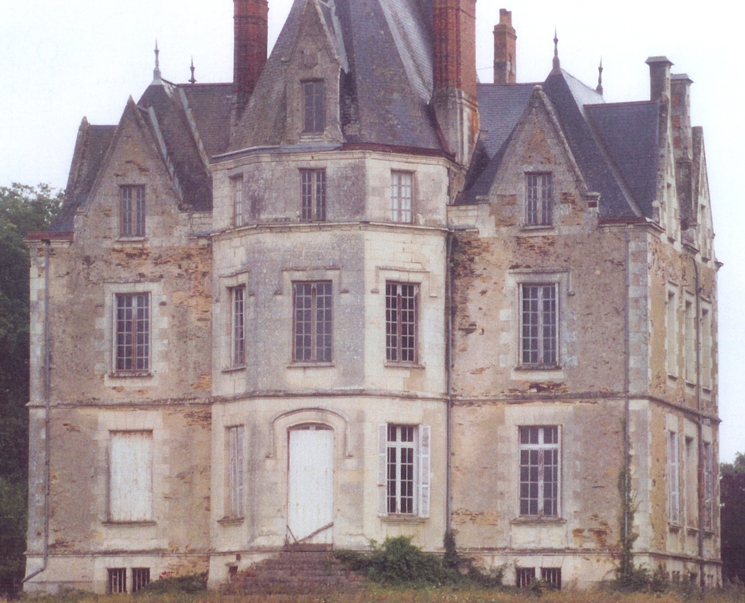 façade sud, Château de l'Anjouère 49370 La Pouèze.